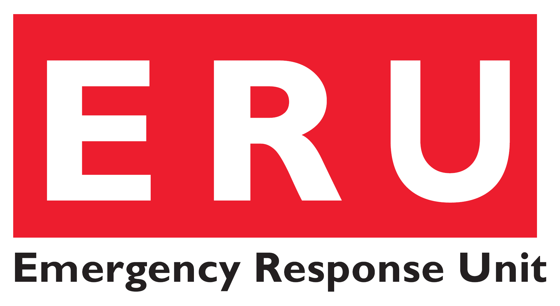 ERU Logo